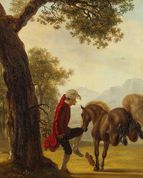 Voltaire og hest (Jan Huber, mellom 1750 - 1775, Hermitage Museum, St. Petersburg)